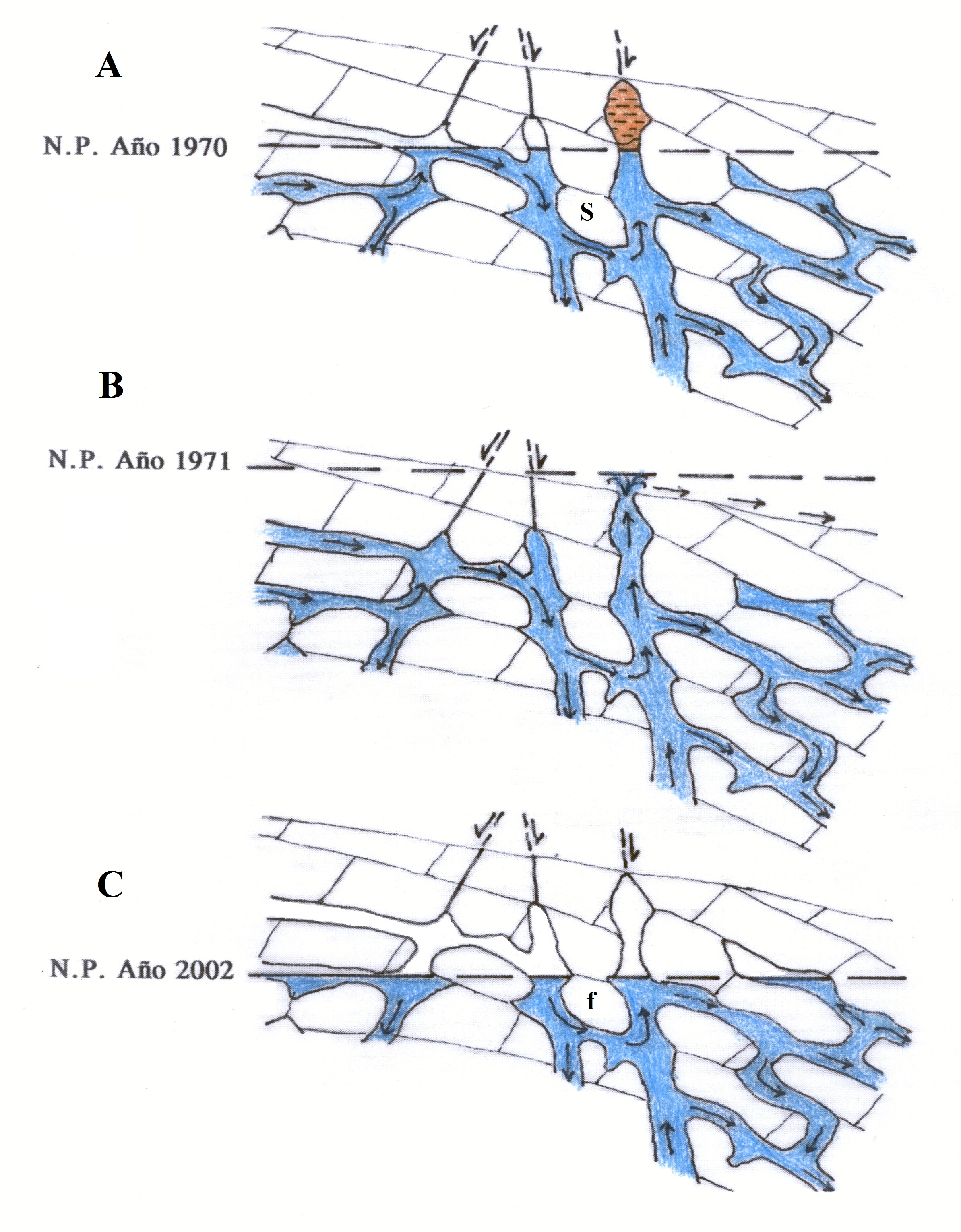 ESQUEMA SOBRE EL FUNCIONAMIENTO DEL FENÓMENO DE EXTRUSIÓN FREÁTICA